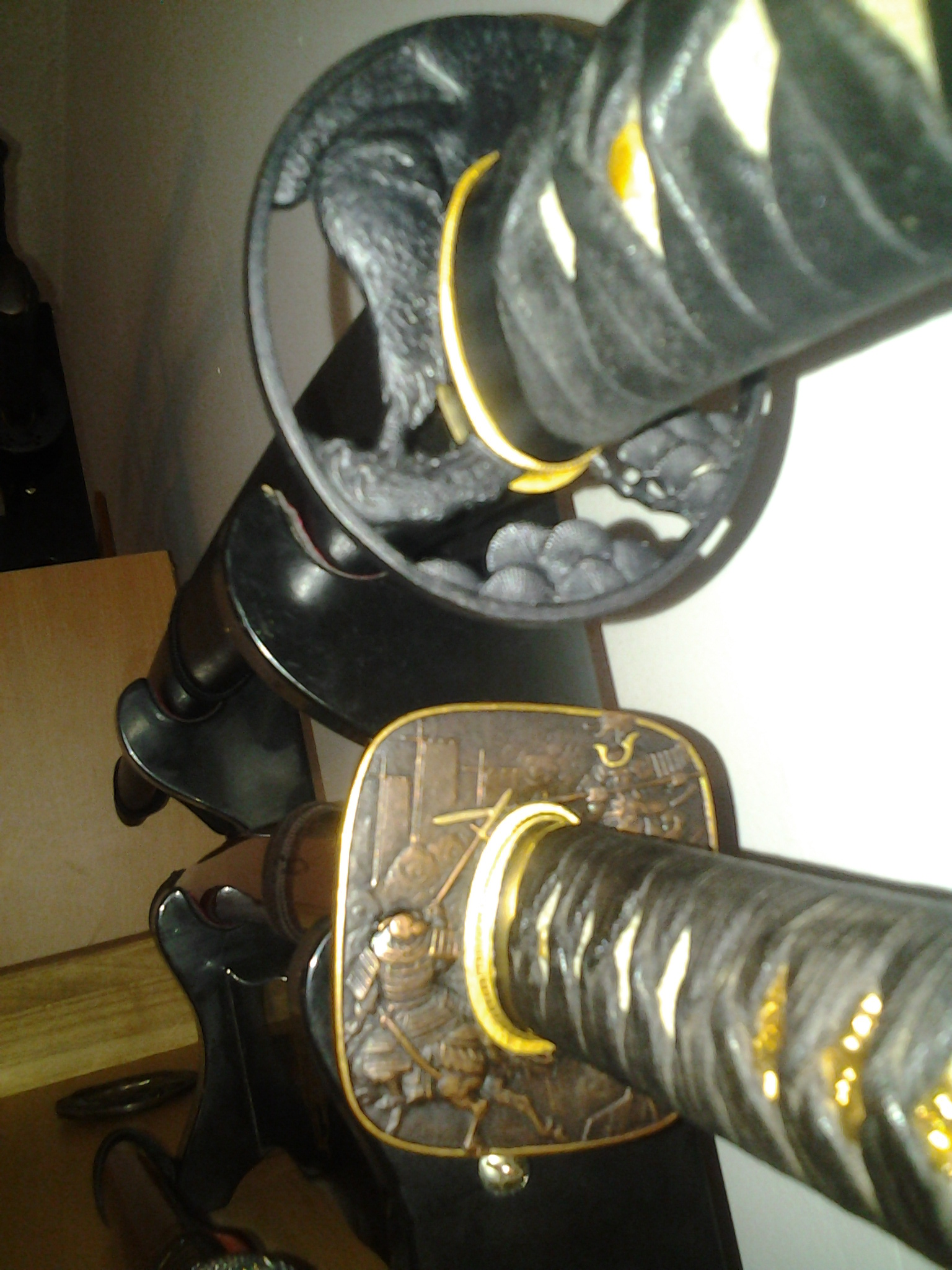 CAS iberia/Hawei Raptor UNOKUBIZUKURI Katana ja Bushido- Wakizashi, Raptor on ns keskiluokan uusituotanto miekka ja Bushido taas ns high end miekka.